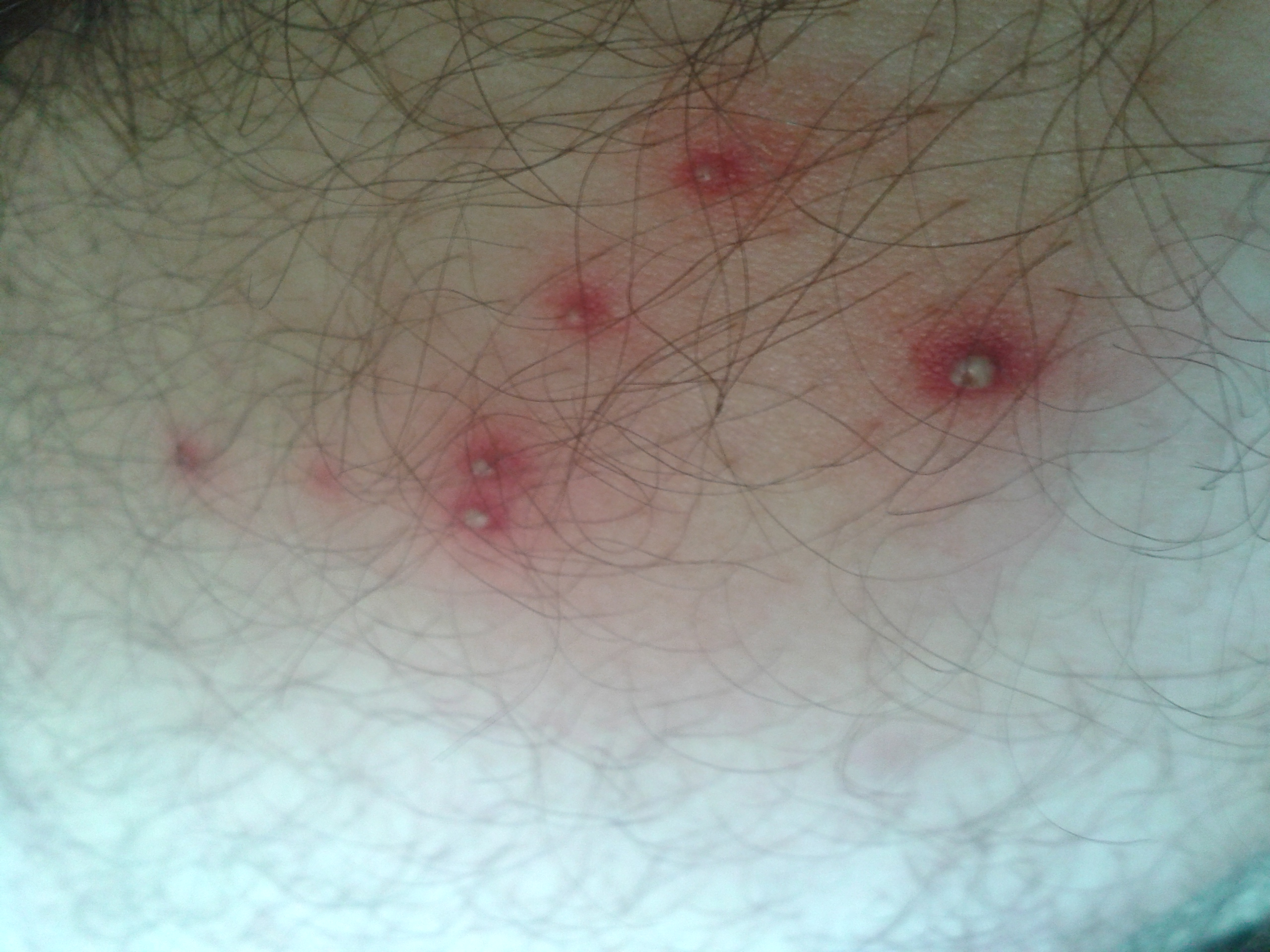 Piquetes de chinche de cama (Cimex lectularius)